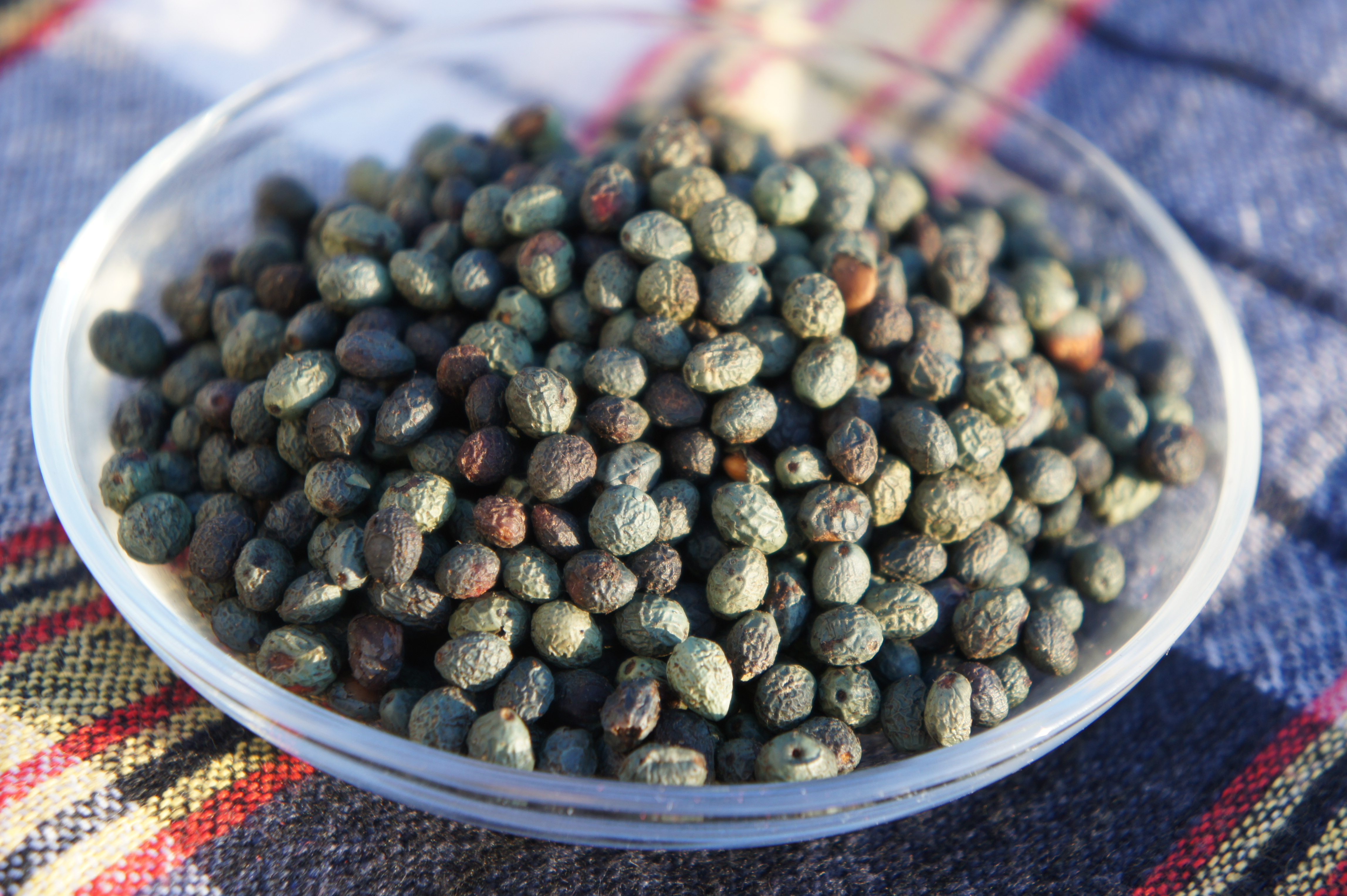 Kurdî: Kezwan